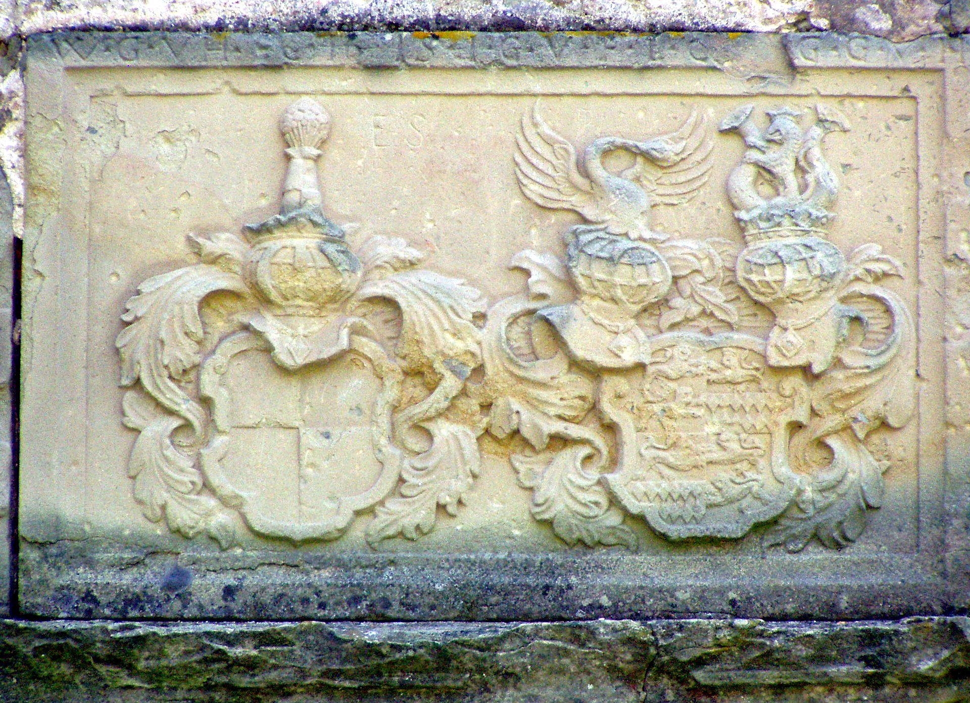 Castell (Unterfranken): Die Wappen am Treppenturm des Bauherrenehepaars des oberen Schlosses: zu Castell / zu Hohenlohe